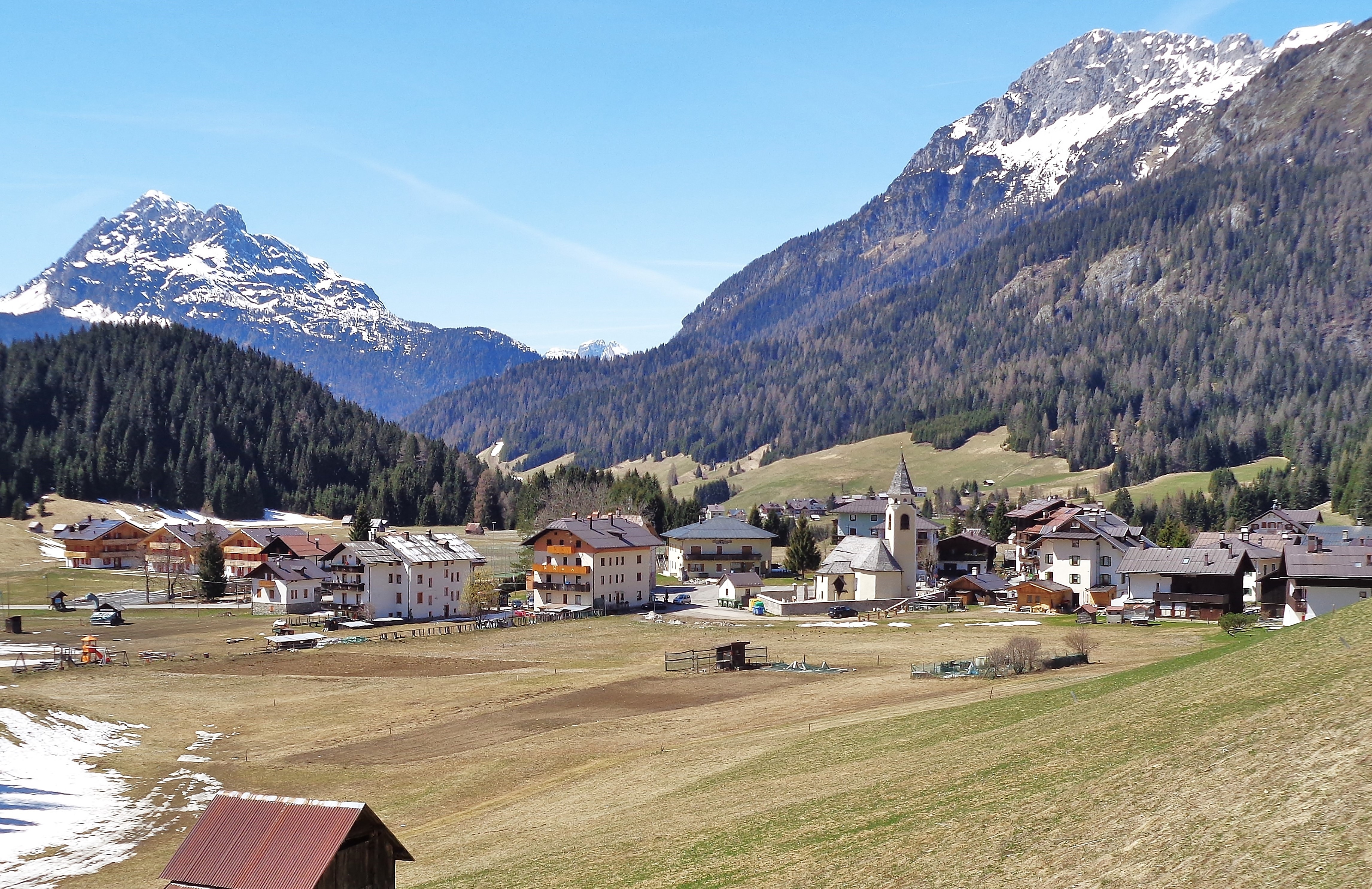 Ortsansicht von Cima Sappada (Sappada, Italien)